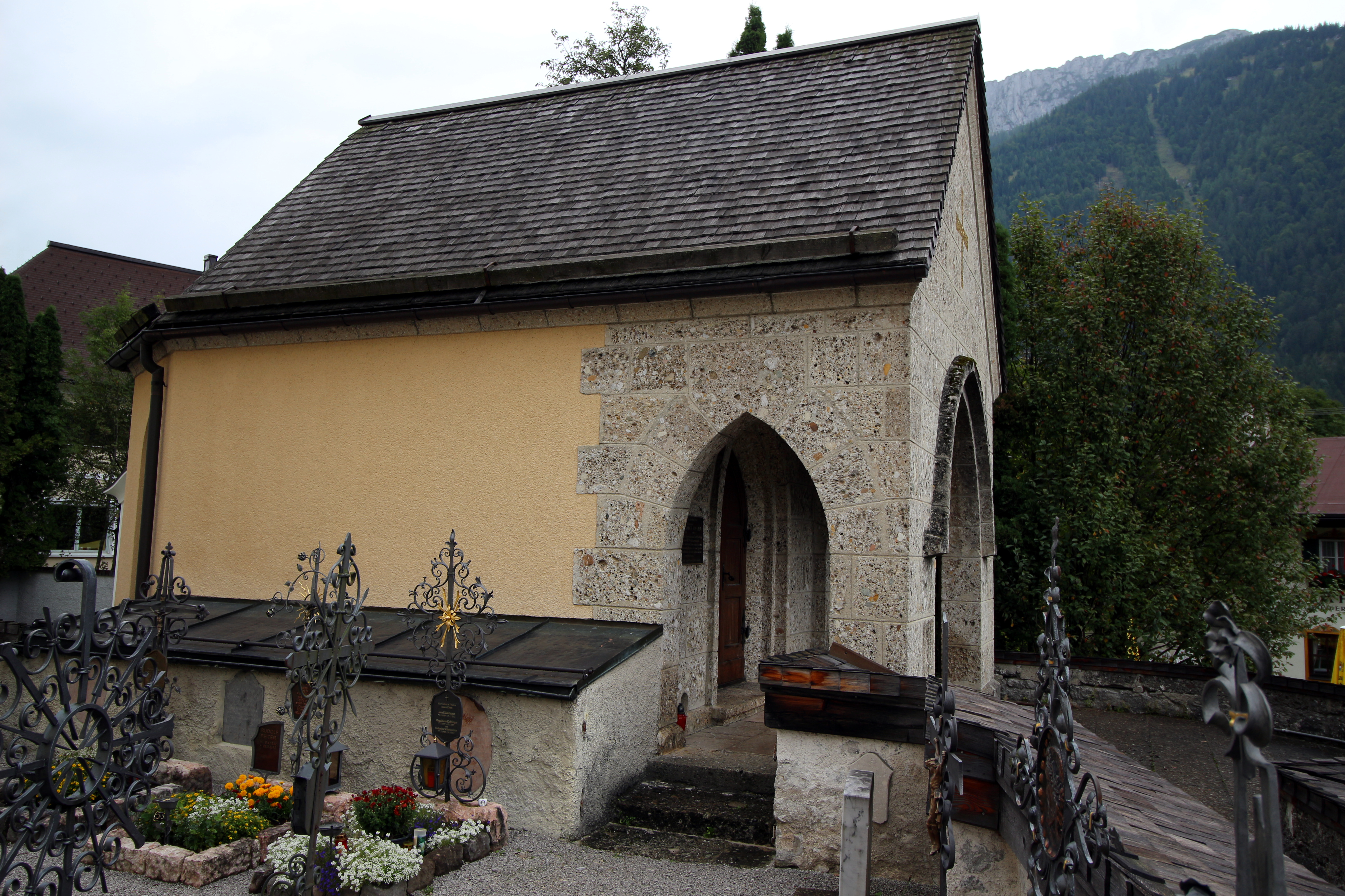 Seitenansicht, ehem. Totenkapelle, Gruft und Ummauerung in Waidring, Tirol.